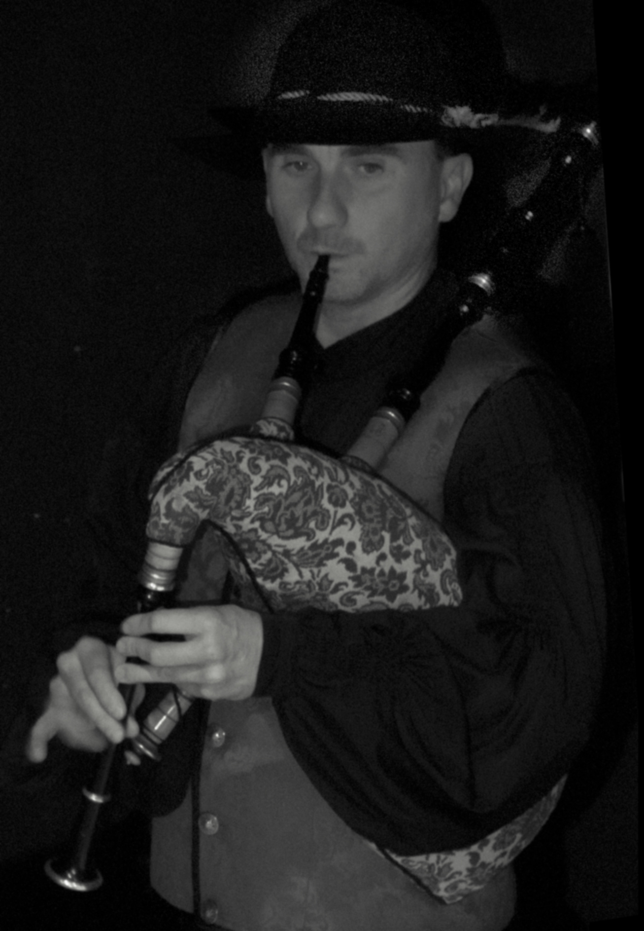 Actuación en Outes